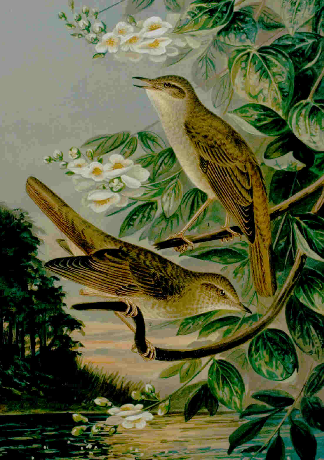 Nachtegaal - [1] - 1905